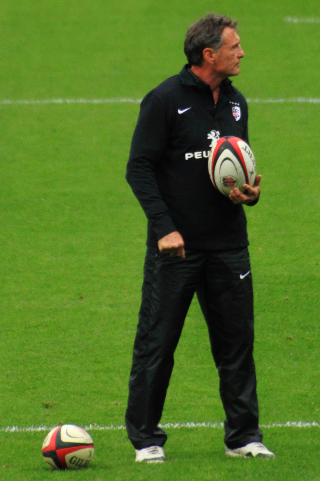 Guy Novès lors du match de top 14 Stade toulousain vs USA Perpignan